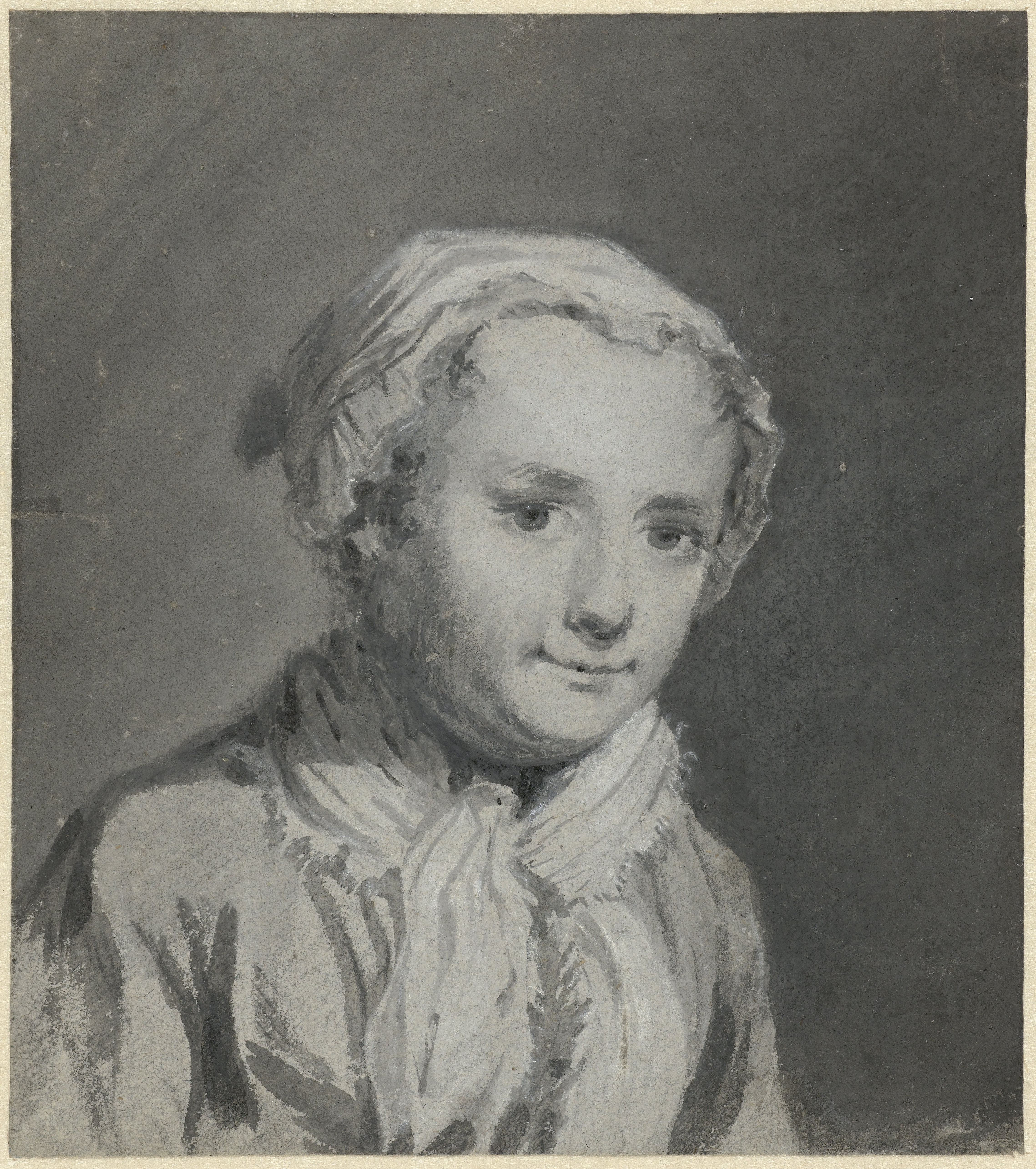 opschrift, verso: 'Het Portret van Sara Troost door haar Vader Cornelis Troost. Men Vergelyke het portret van haar in zwarte kunst door C. Troost.' Gemaakt 1742-1750.